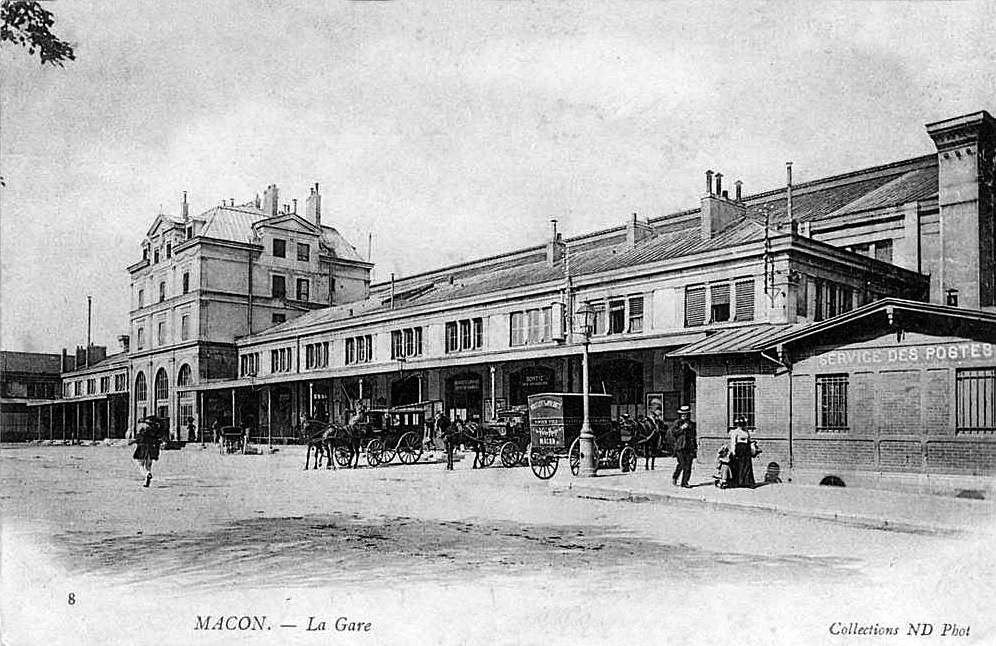 Gare de Mâcon vers 1900 : le bâtiment voyageurs créé par l'architecte Alexis Cendrier.